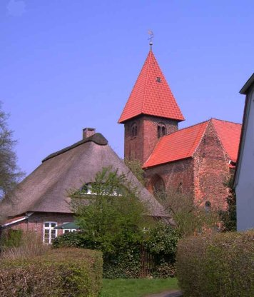 Klosterkirche in Osterholz-Scharmbeck. Photographiert im April 2005. Photograph: CWitte